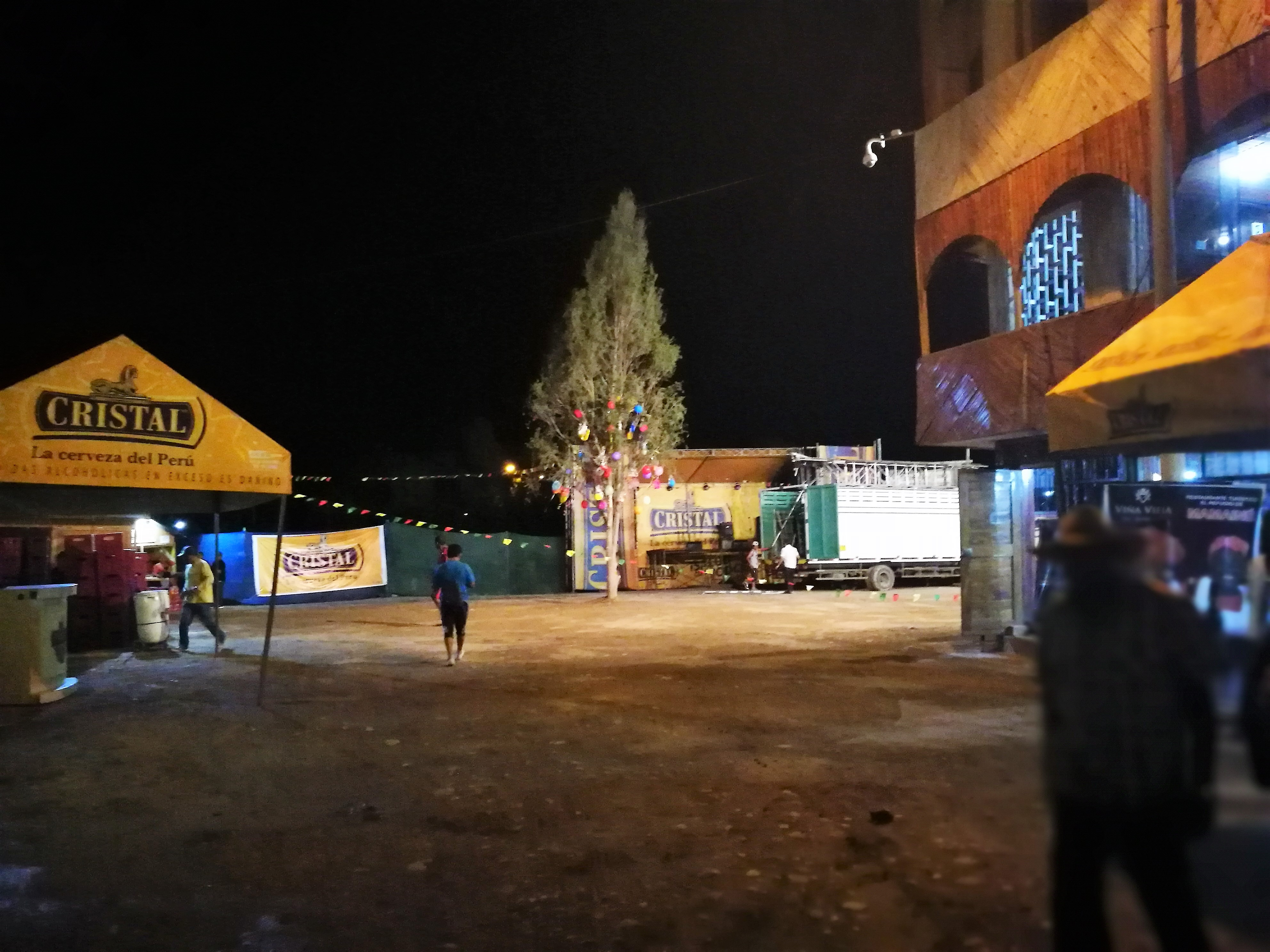 Festa de la Yunza al restaurant Mamainé de el Carmen, Chincha